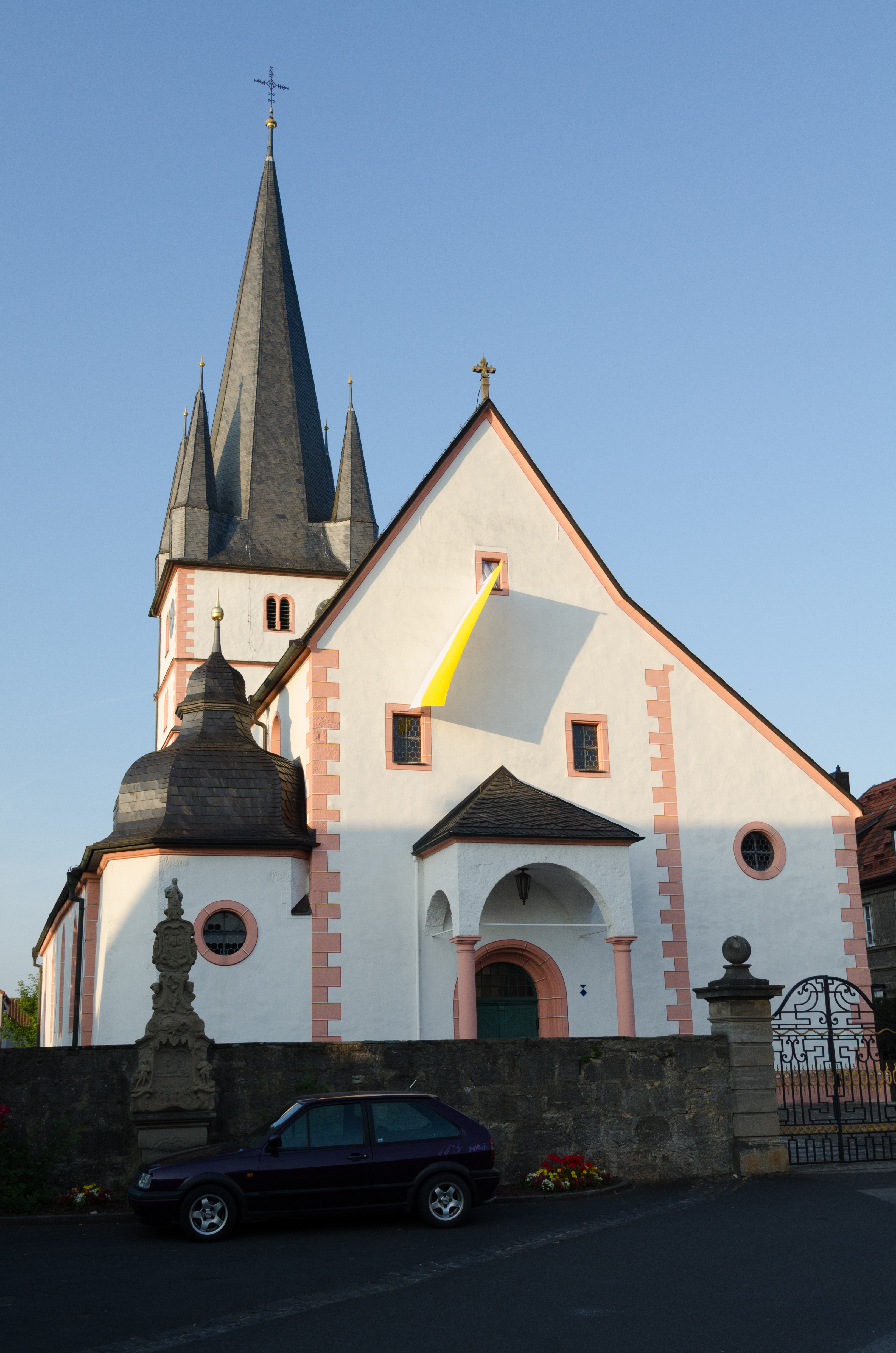 Salz, Pfarrkirche Mariae Himmelfahrt